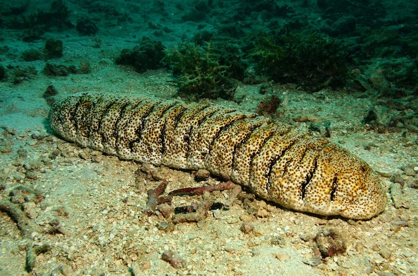 Une holothurie Holothuria fuscopunctata.